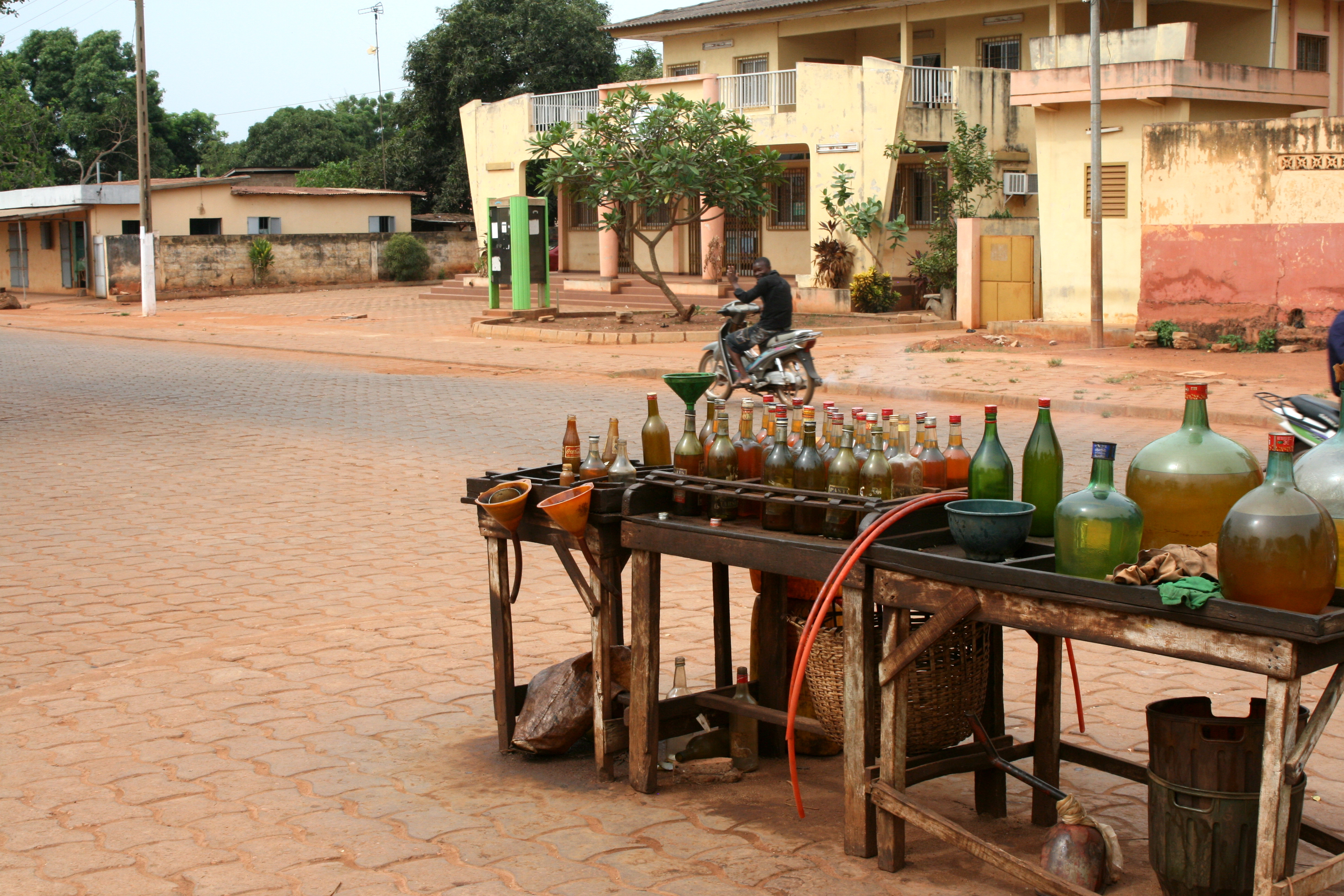 Tankstelle in Abomey, Benin.